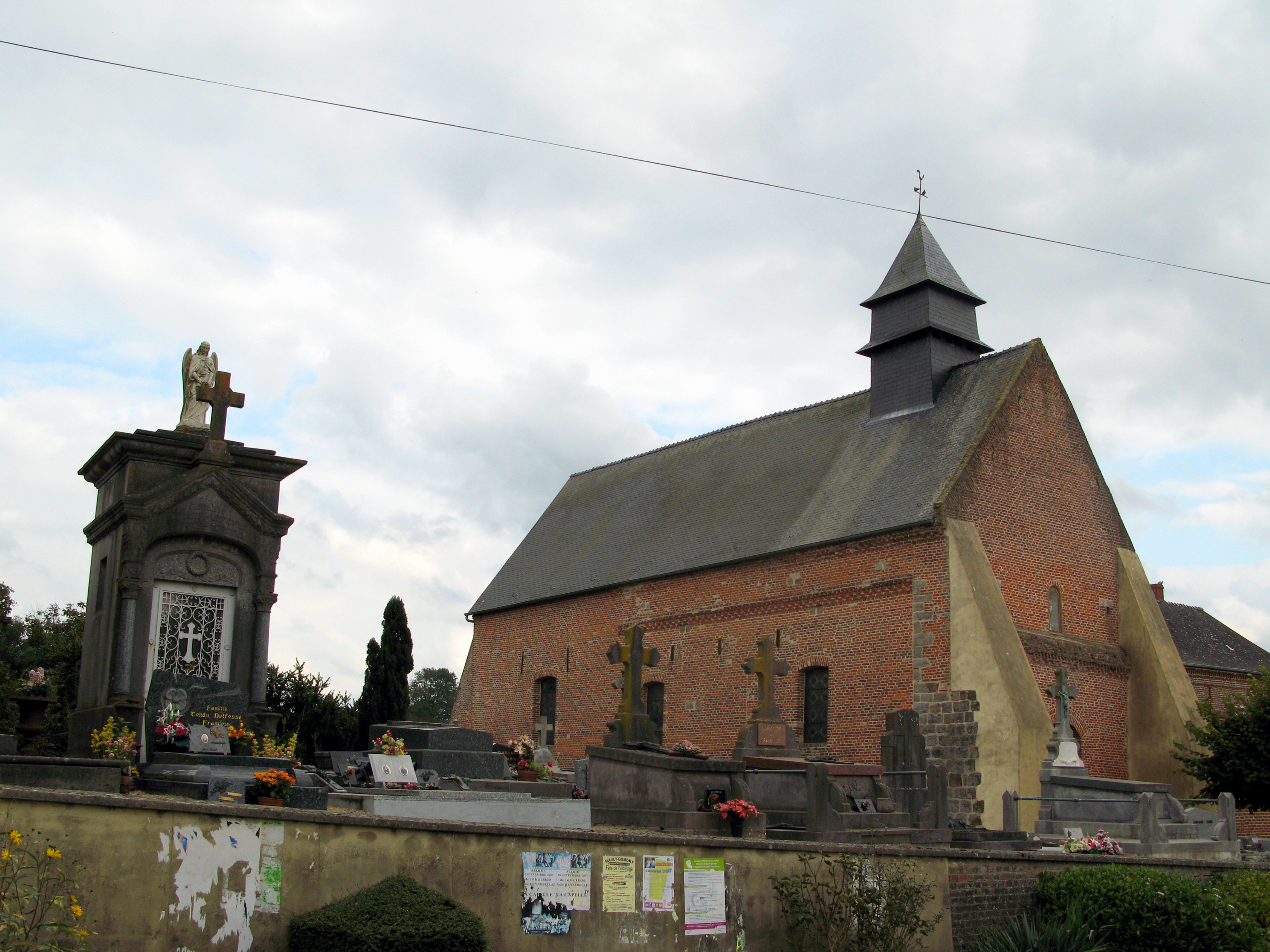 Crupilly (Aisne, France) - L'église fortifiée (façade nord).